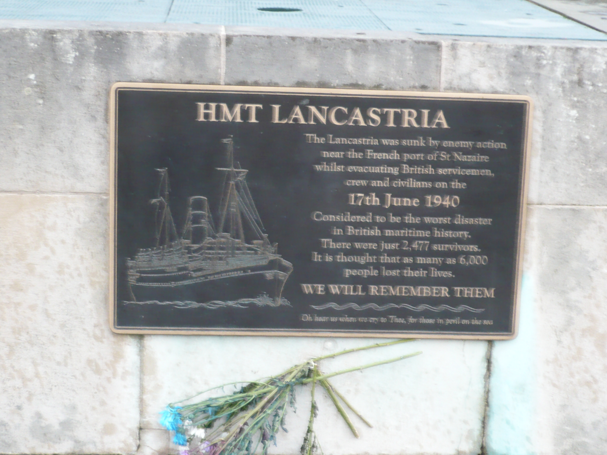 RMS/HMT "Lancastria", tablica pamiatkowa w Liverpool na Pier Head ( odsłonieta we wrzesniu 2013.